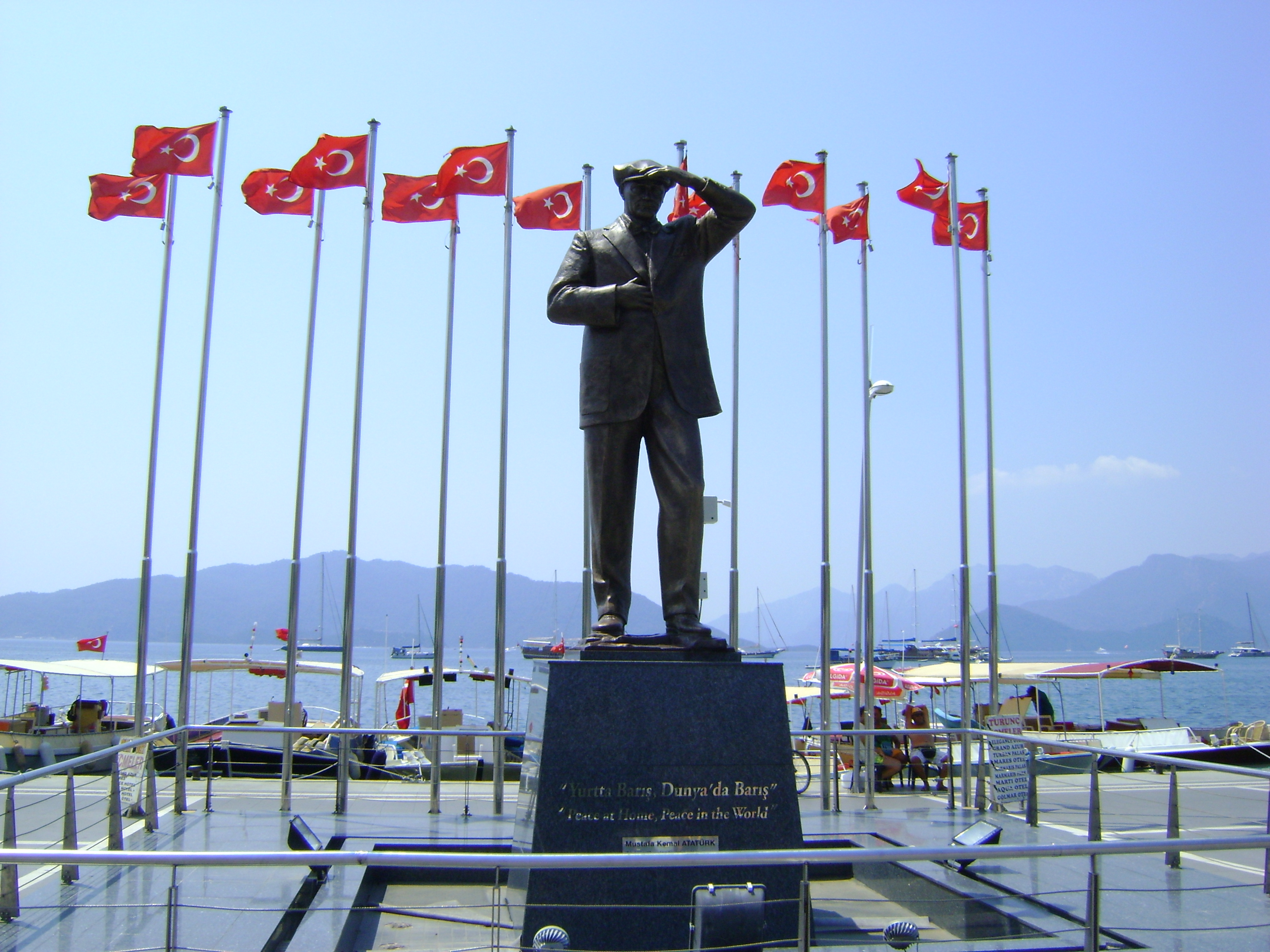 Місто Мармарис. Туреччина. Червень 2018 р.